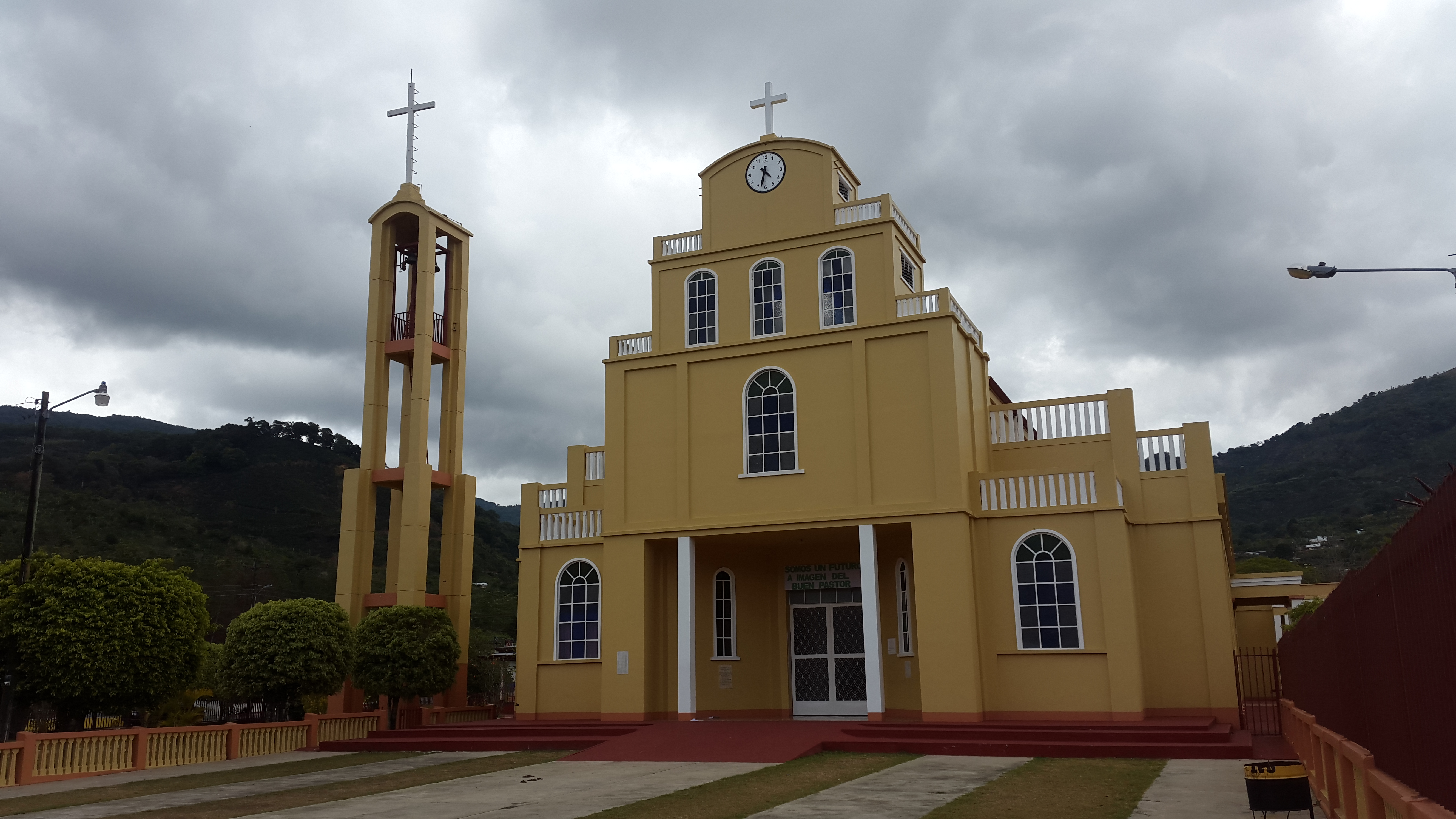 Iglesia de Santa María de Dota, Costa Rica.